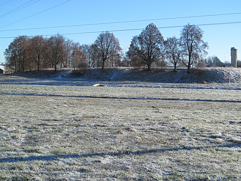 Клецк